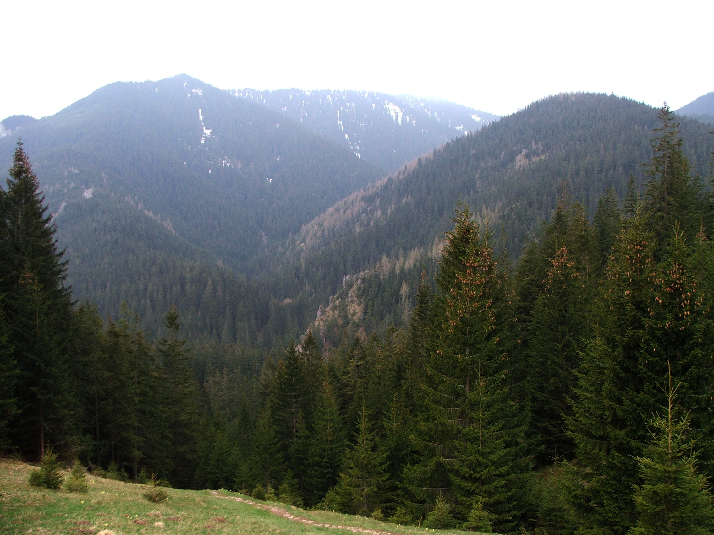 Dolina Głębowiec, Hrubas, Jaworzyński Przysłop. Widok z polany Jamy